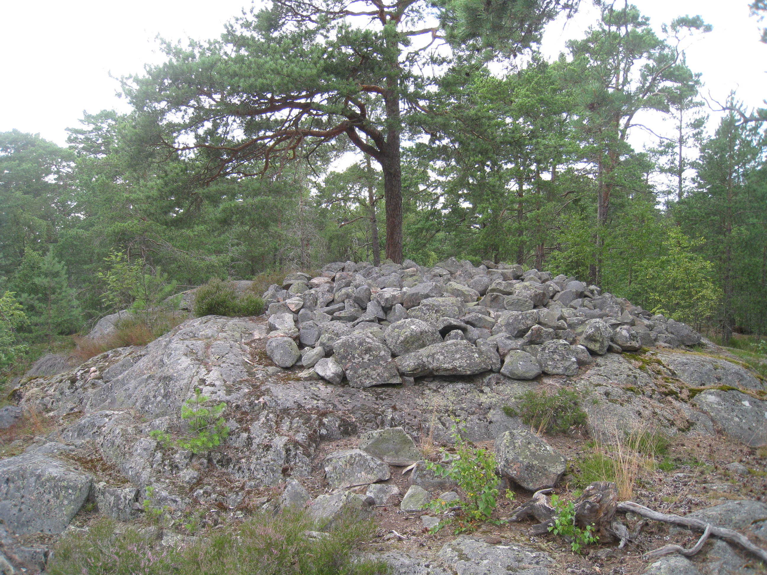 Bronsåldersröse i Ålstensskogen inom Smedslättens område i Bromma väster om Stockholm. Röset är beläget på ett krön av moränbunden bergrygg i Ålstensskogen nordväst om Solviksbadet. Röset, som är 8 meter i diameter och 0,6 meter högt, ligger inom stadsdelen Smedslätten och kan dateras till yngre bronsålder.